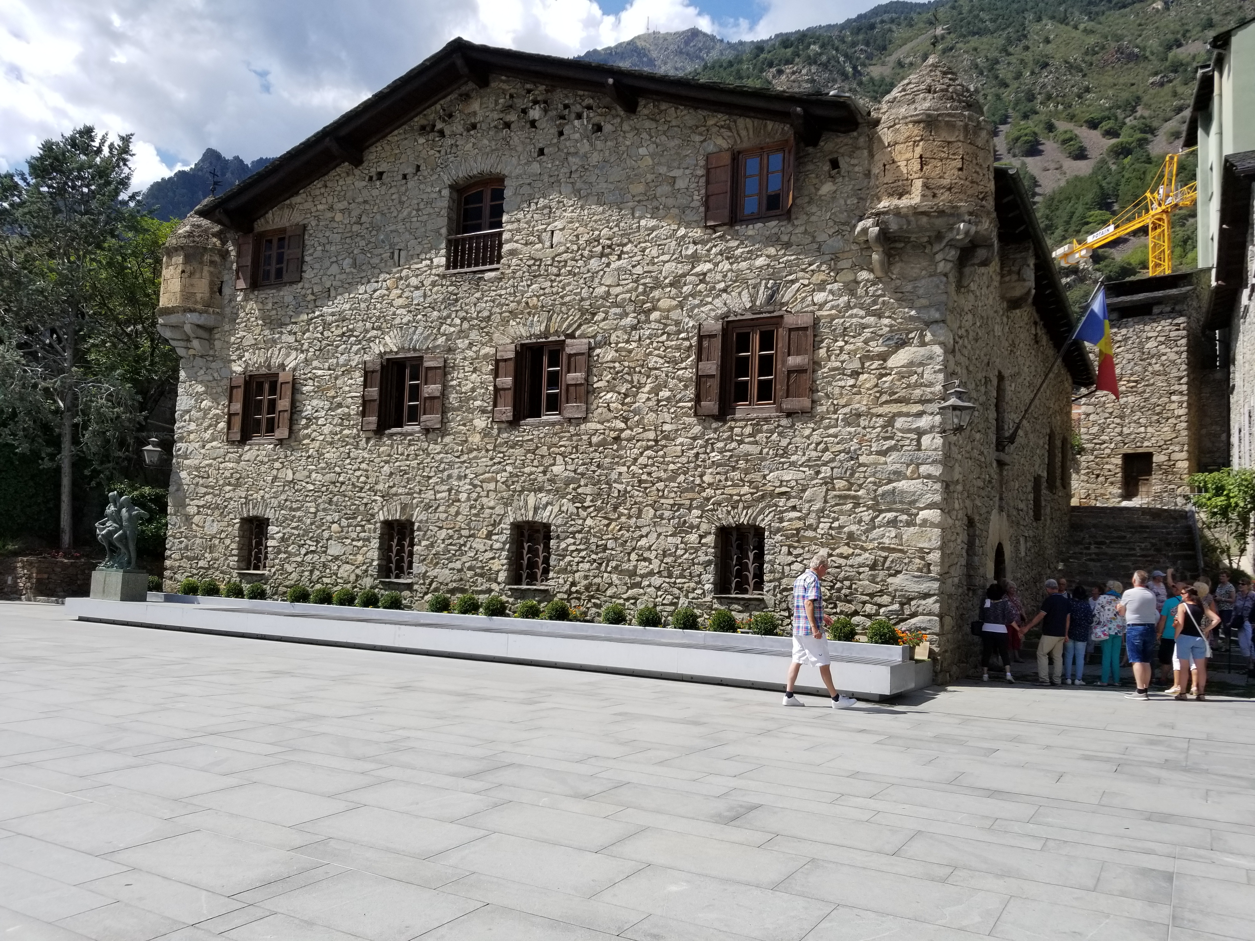 הפרלמנט הישן של אנדורה